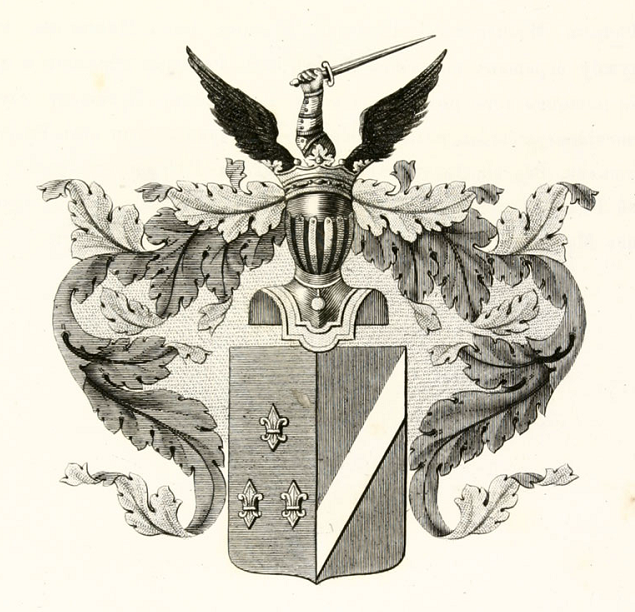 Герб рода Молчановых потомства Григория Ивановича Молчанова